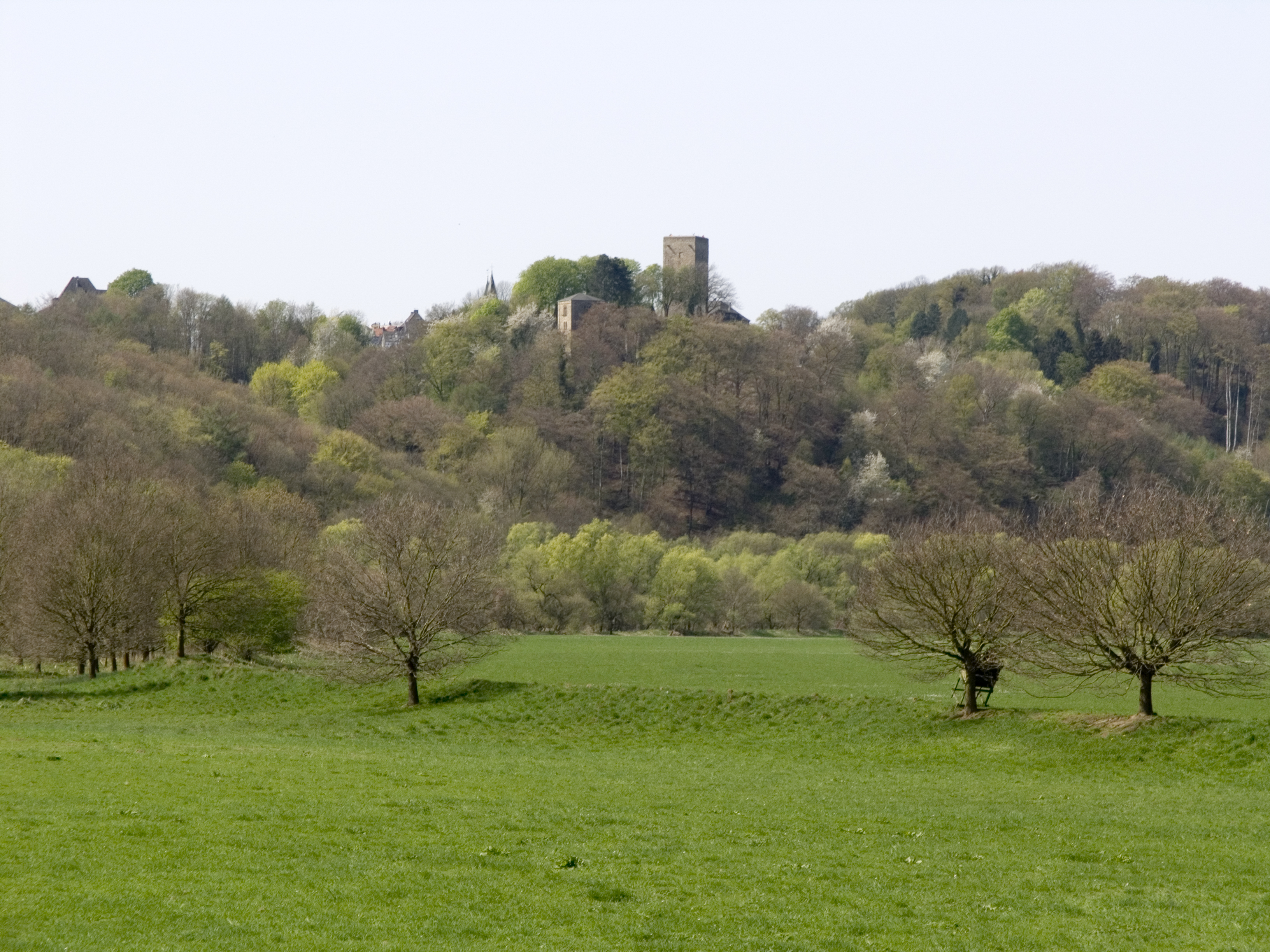 Северный Рейн - Вестфалия, Хаттинген. Замок Бланкенштайн